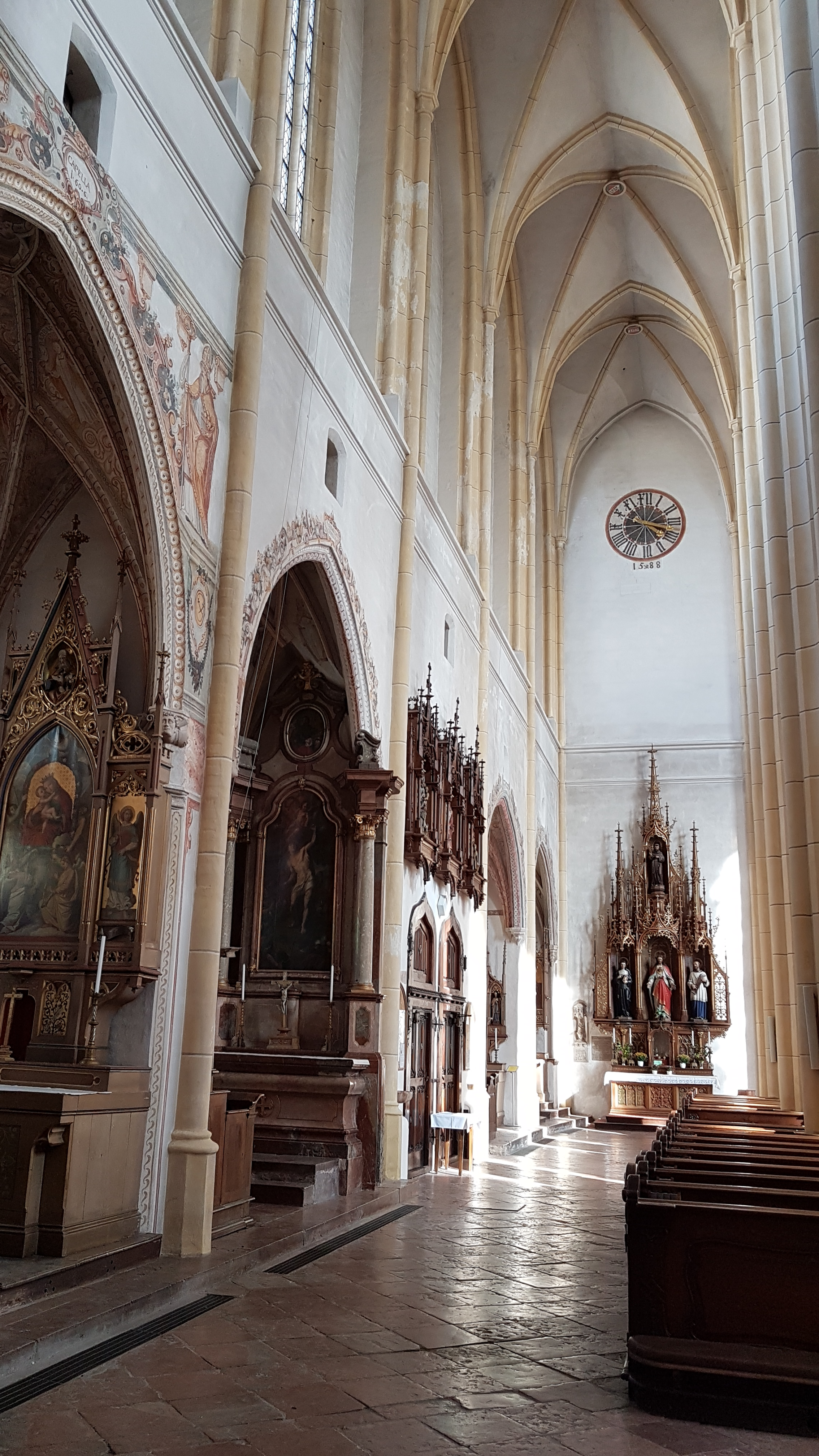 St. Nikolaus (Neuötting)